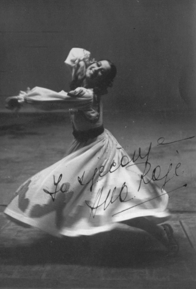 Ana Roje